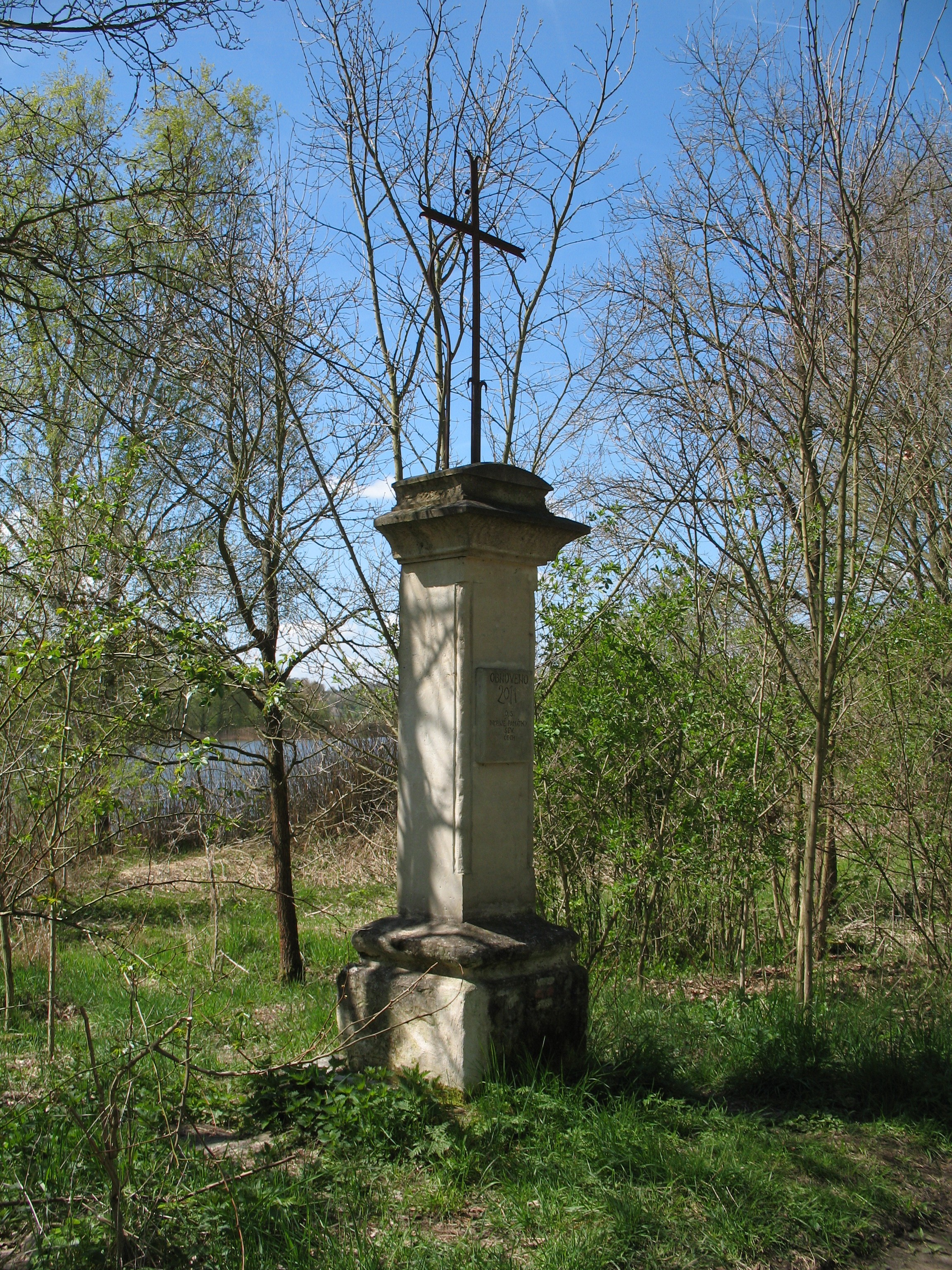 Dolanský rybník u Stvolínek. Kříž, opravený v roce 2011 občanským sdružením Drobné památky severních Čech